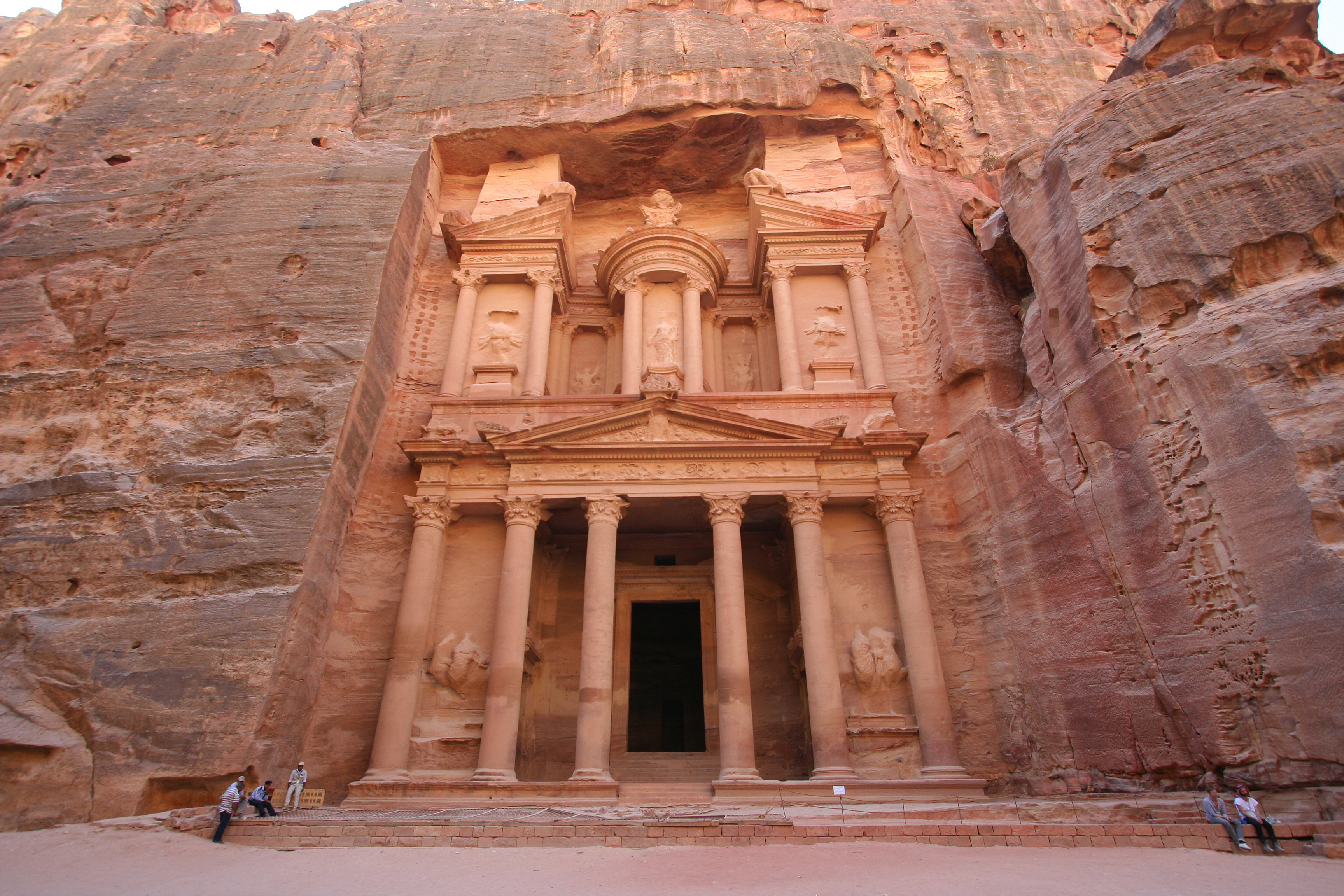 El Khasneh, a Petra.